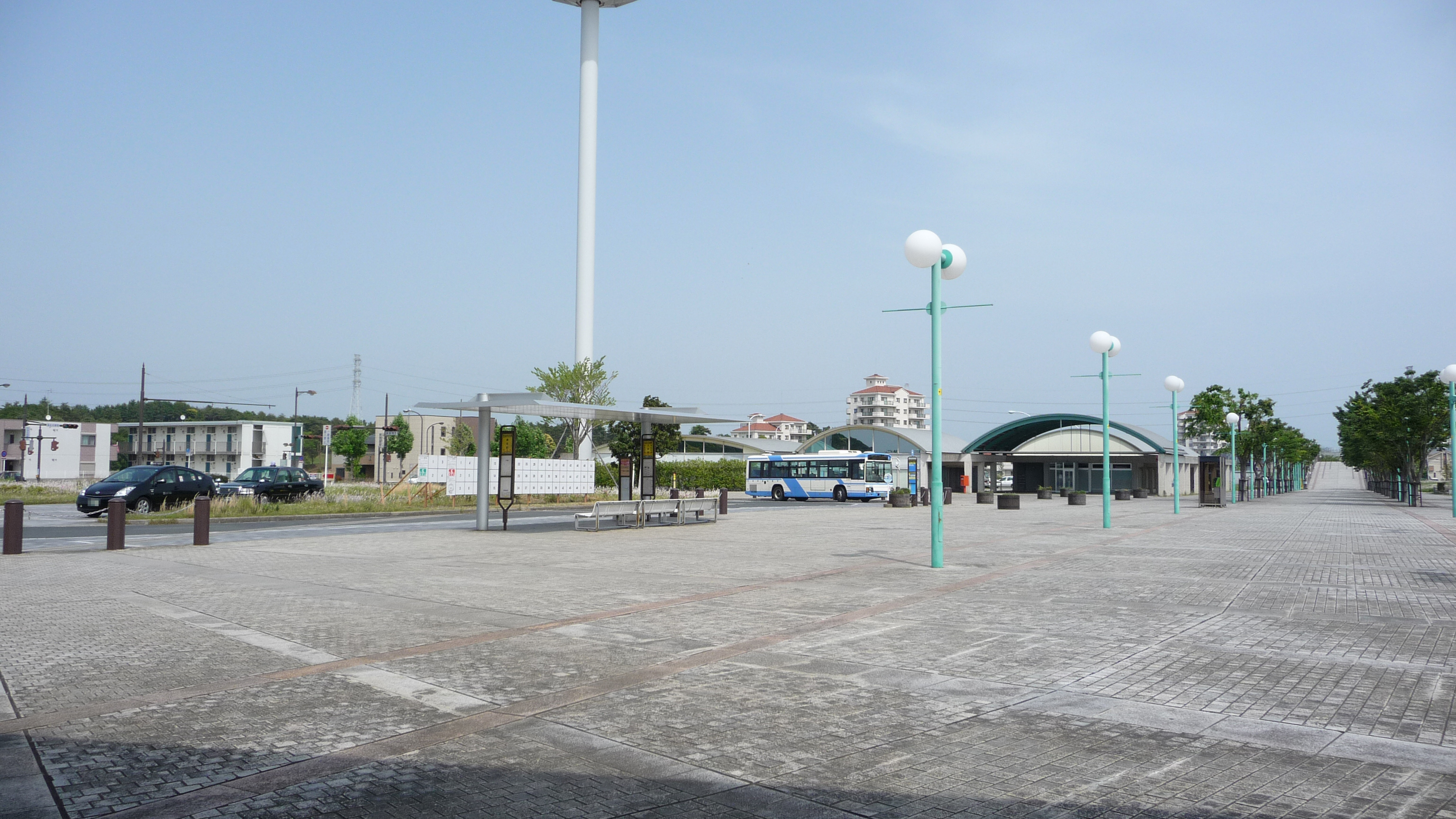 京成千原線ちはら台駅前